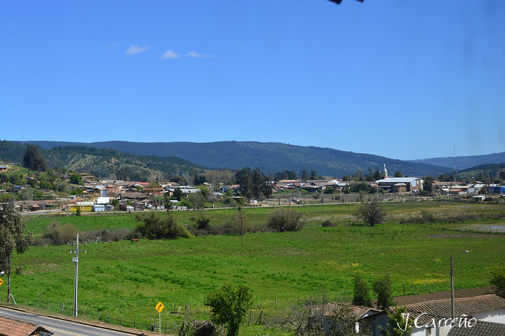 Vista de Curepto desde la entradaque viene de Talca